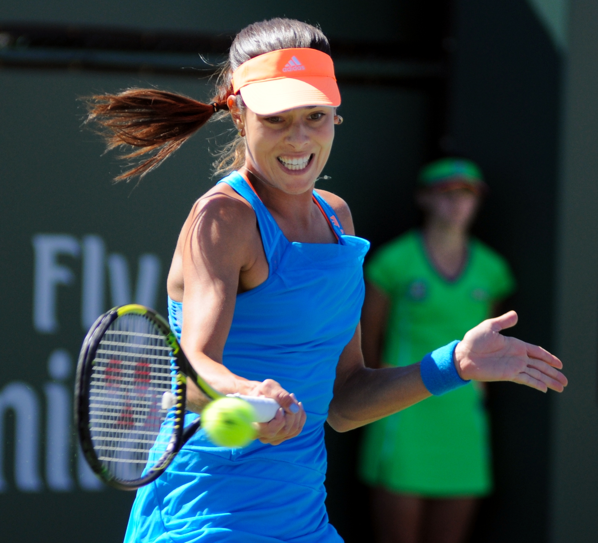 2014 BNP Paribas Open